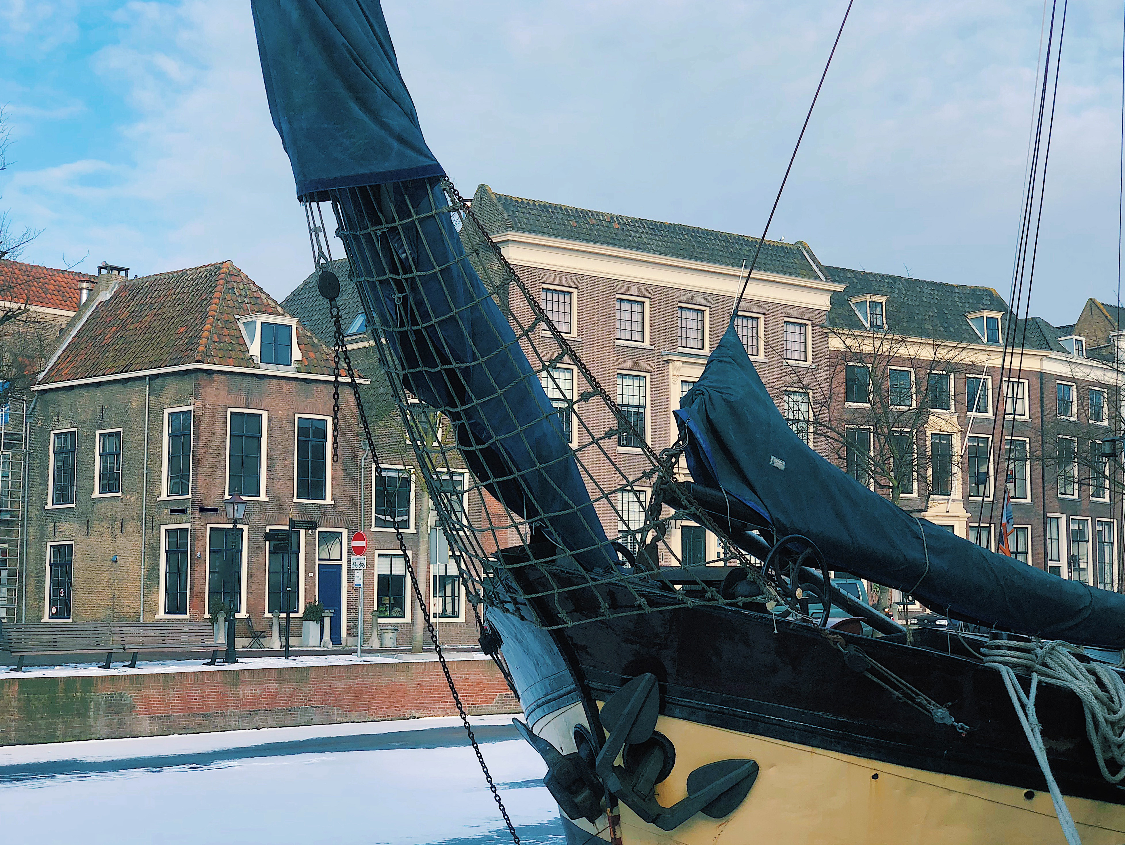 Rijksmonument woonhuis Lange Haven 99 is zichtbaar, inclusief voorzijde schip en bevroren gracht